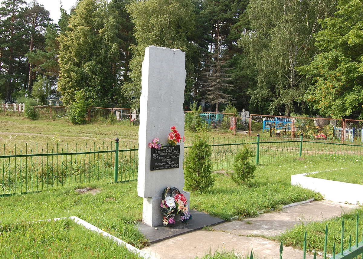 Ушачи. Памятник евреям местечек Ушачи и Кубличи, убитых нацистами и их приспешниками в январе 1942 года.